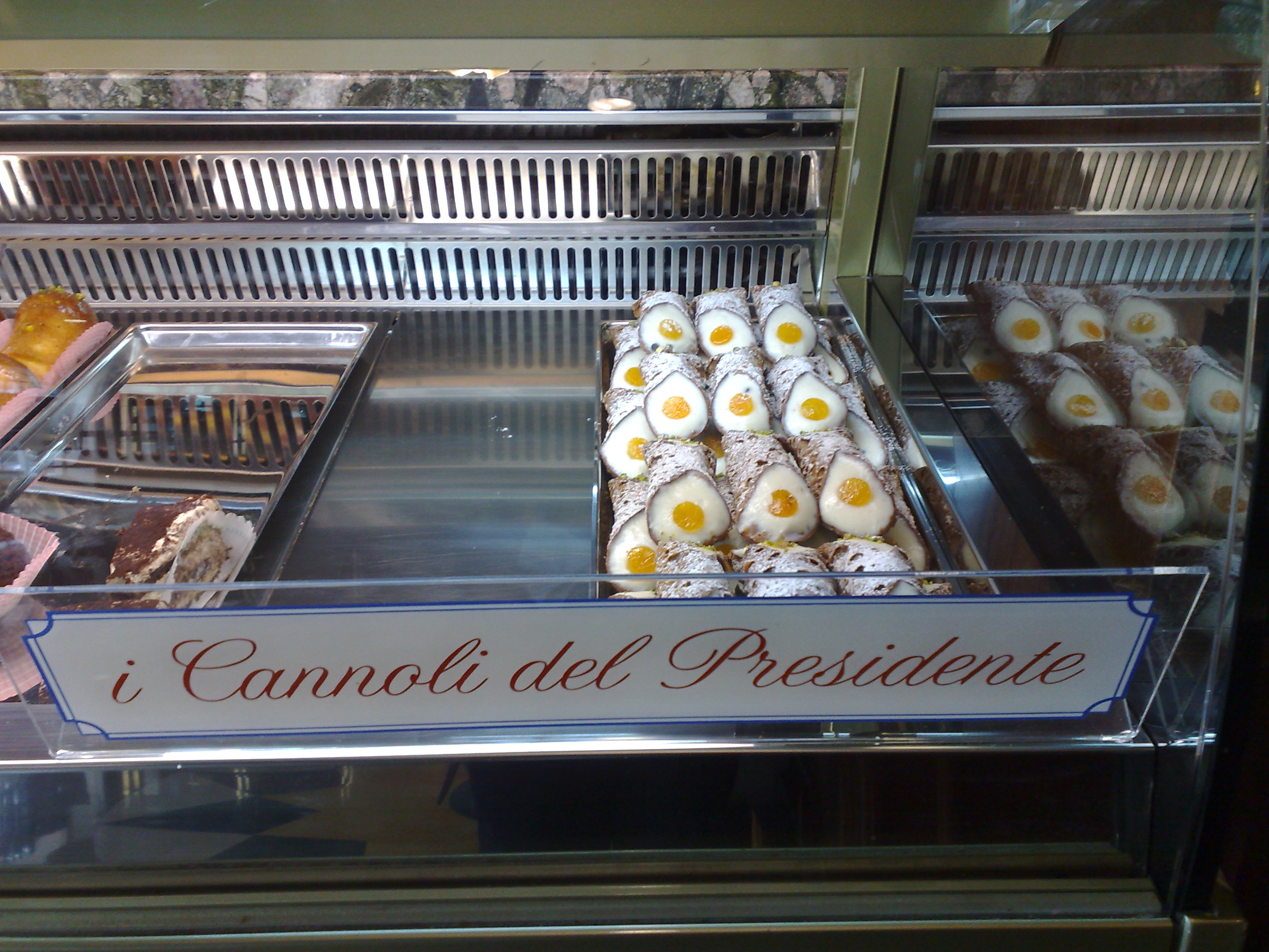 Cannoli siciliani, qui chiamati "cannoli del presidente" in riferimento all'ex presidente della Sicilia Totò Cuffaro. Il pasticcere gliene ha regalato un vassoio, offerto poi in occasione dei festeggiamenti per non essere stato condannato per favoreggiamento della mafia.